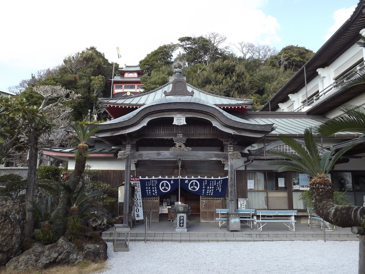 津照寺の大師堂